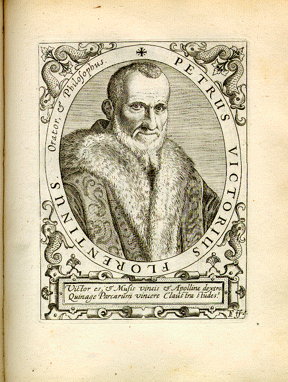 piero vettori, printing from Boissard, Jean-Jacques edition, 1652-1669